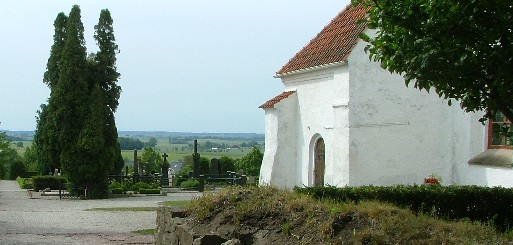 Flachland zu Dalby